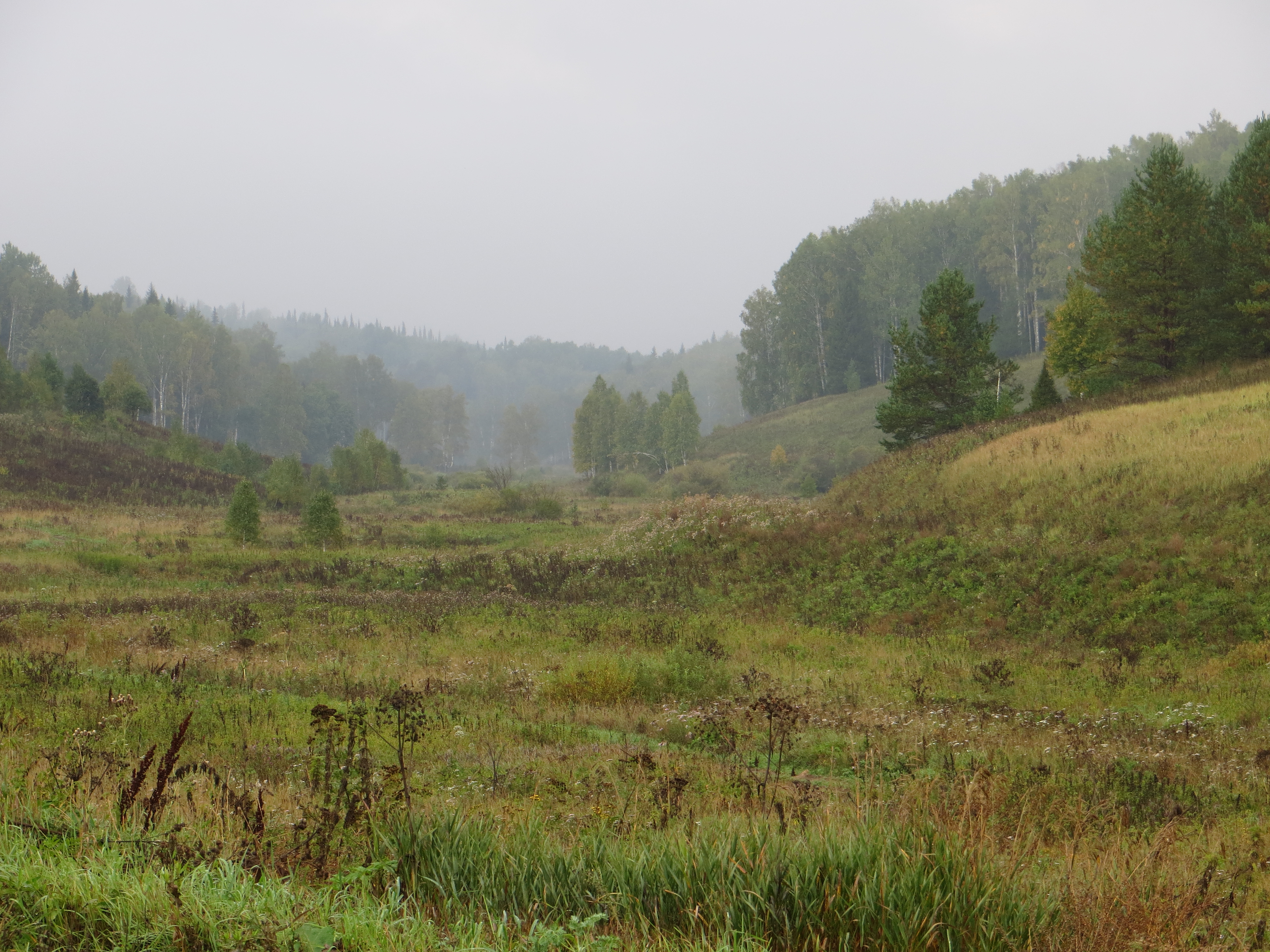 Лог Уфимского плато